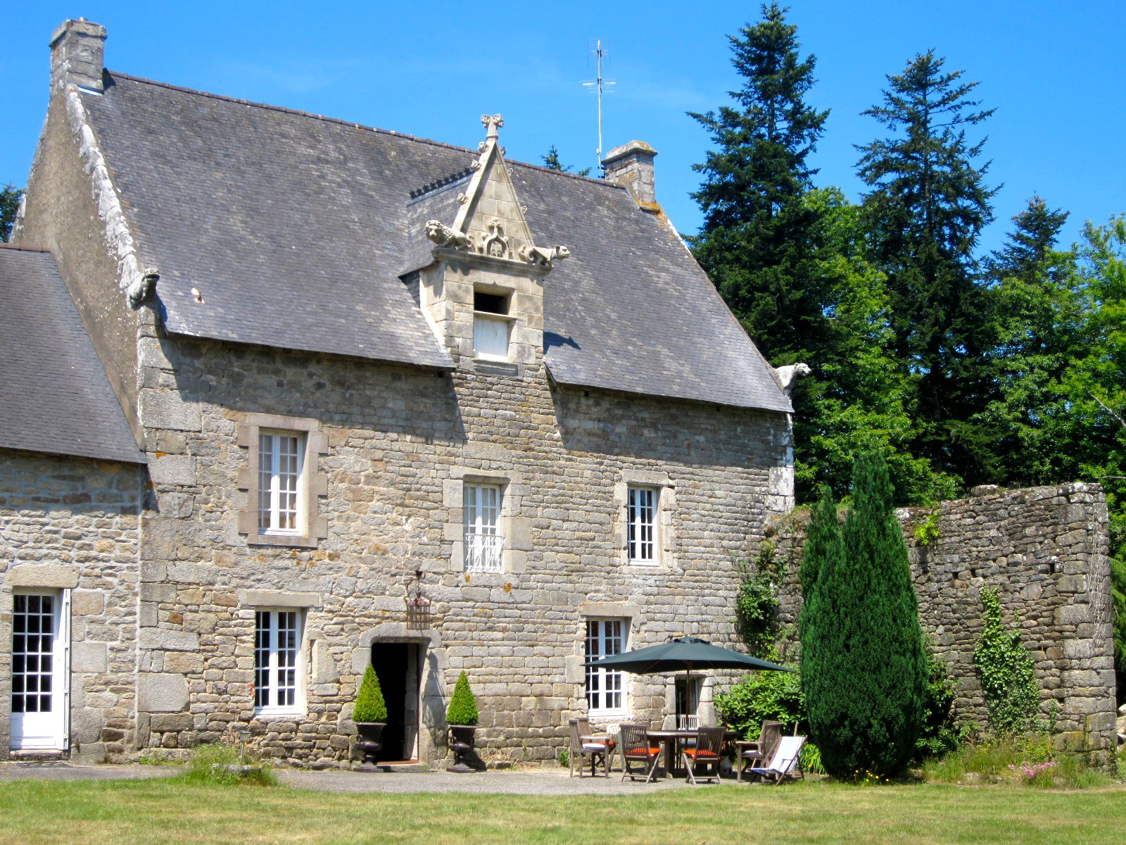 manoir construit vers 1530 par Robert de Kerboulard